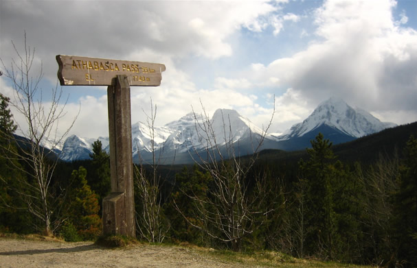 athabasca pass